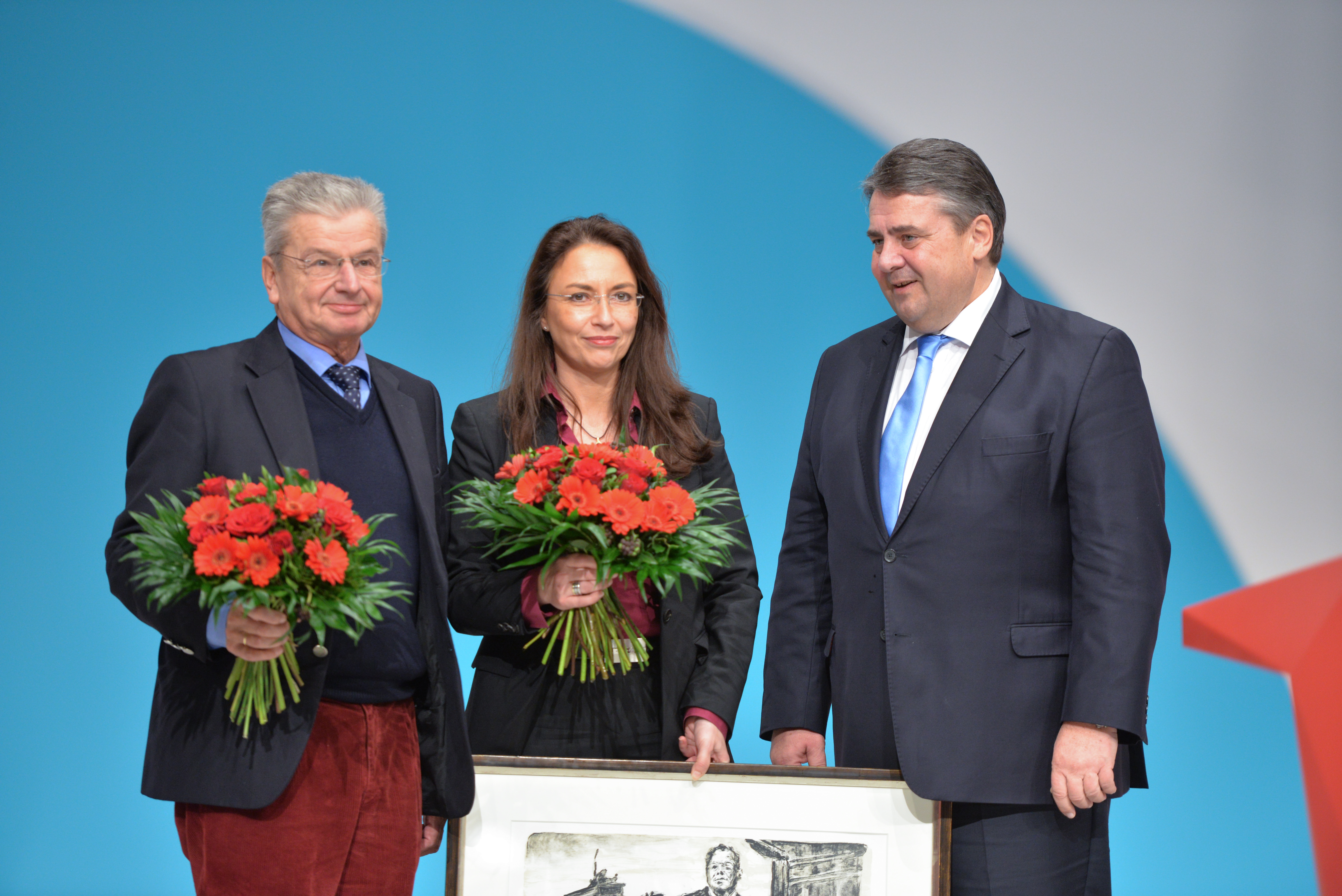 SPD Bundesparteitag 2015 - Gruppenaufnahmen